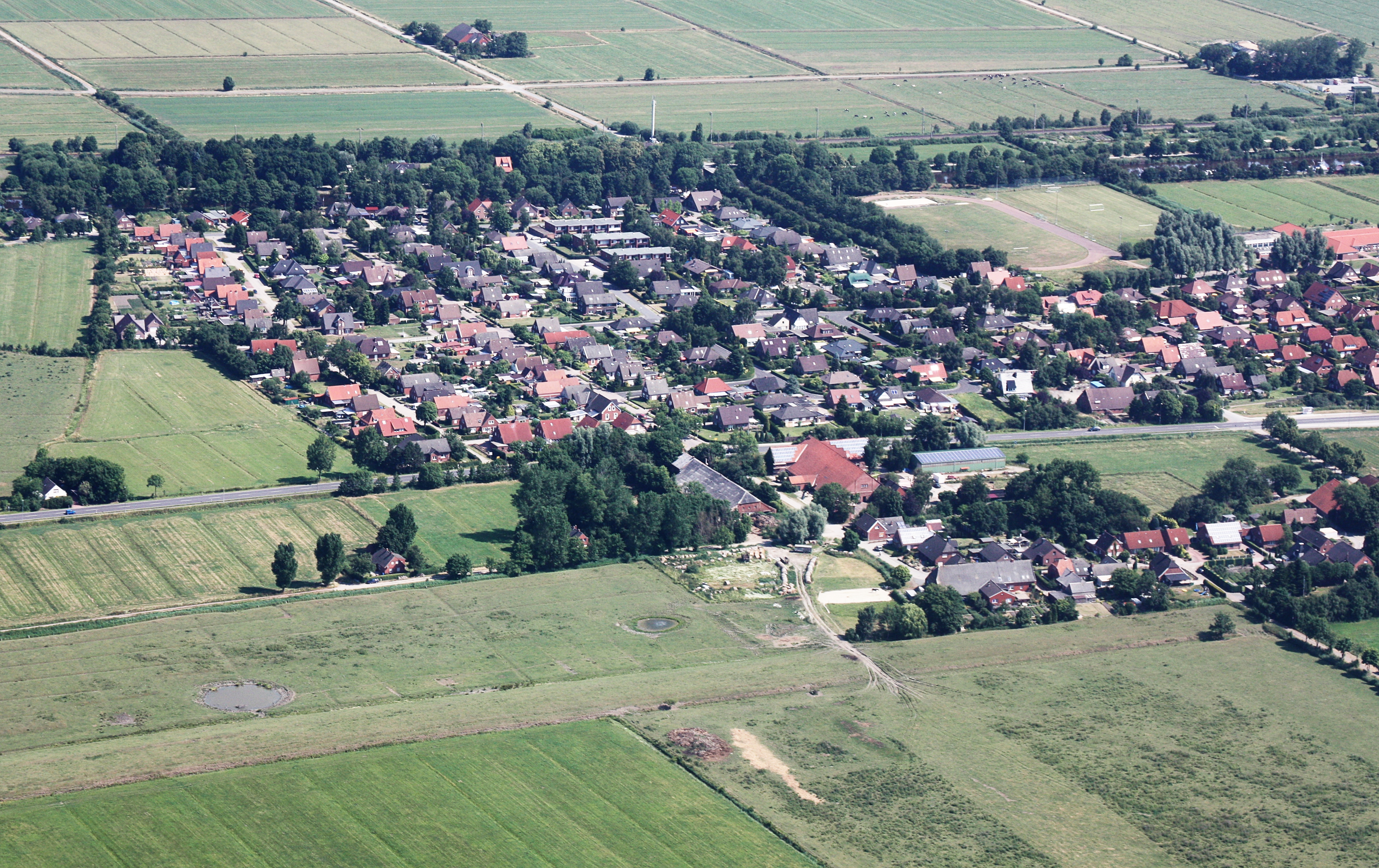 Luftaufnahme; Flug von Leer nach Emden; Flughöhe 1500 ft; Juli 2010; Originalfoto bearbeitet: Tonwertkorrektur und Bild geschärft mit Hochpassfilter